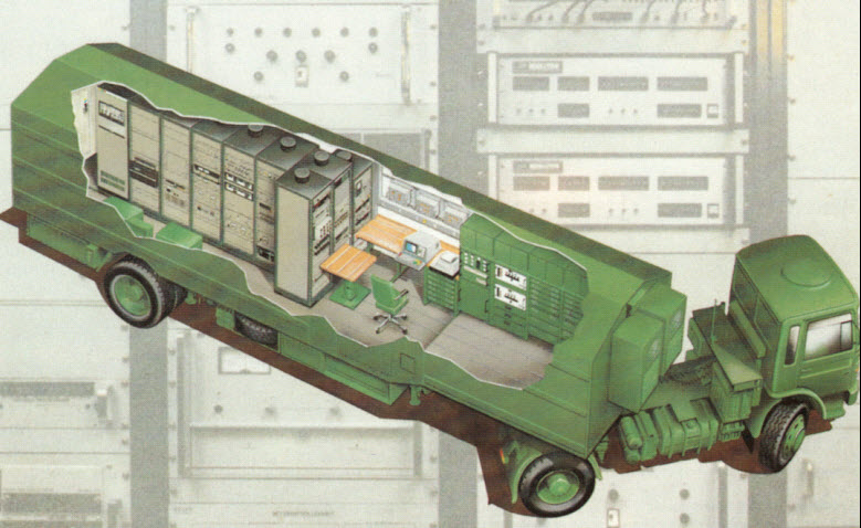 REMUS Prüfstation mit Zugmaschine